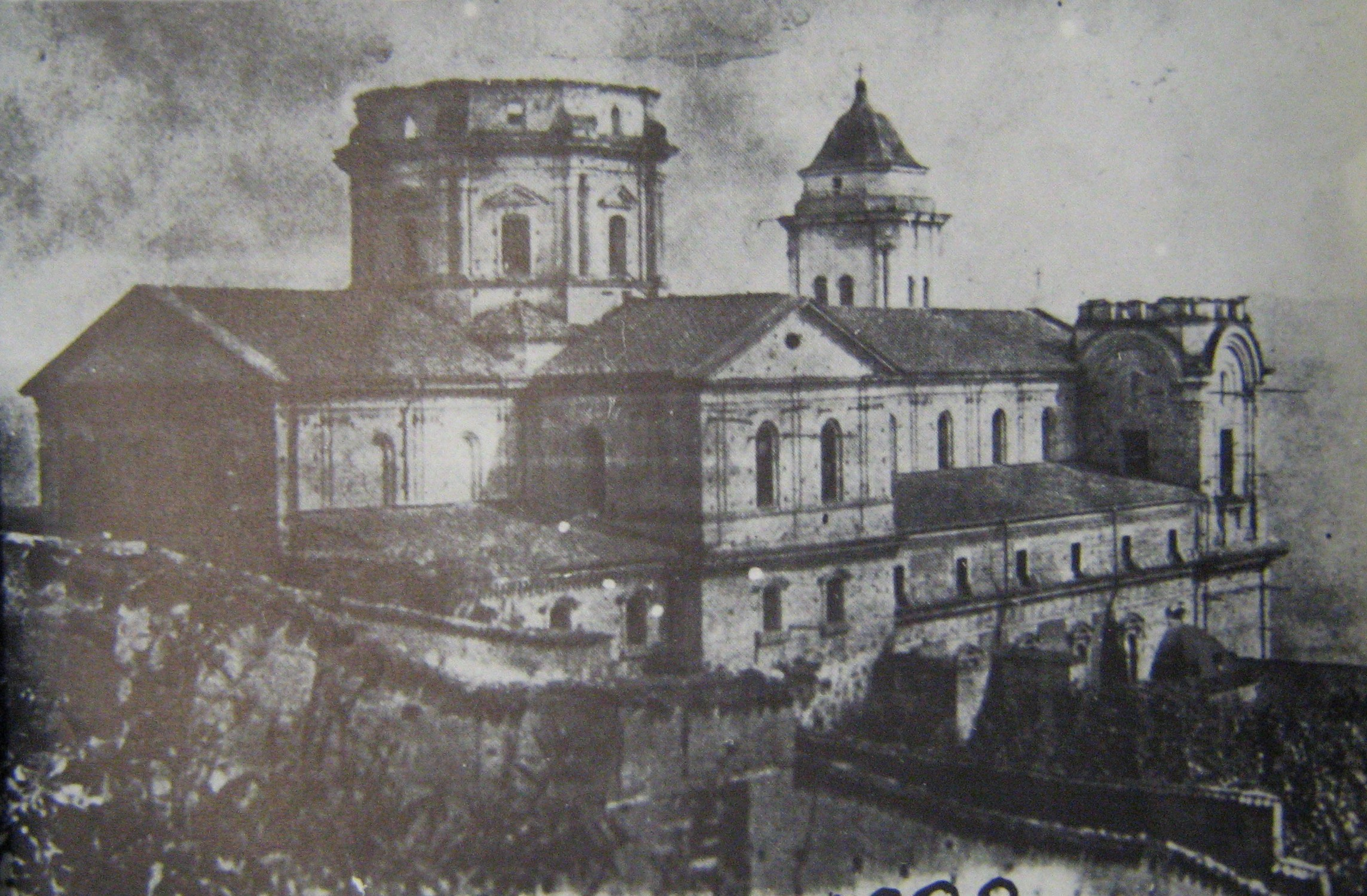 Basílica Menor de Nuestra Señora de la Merced de Yarumal en construcción, 1892, Antioquia, Colombia.